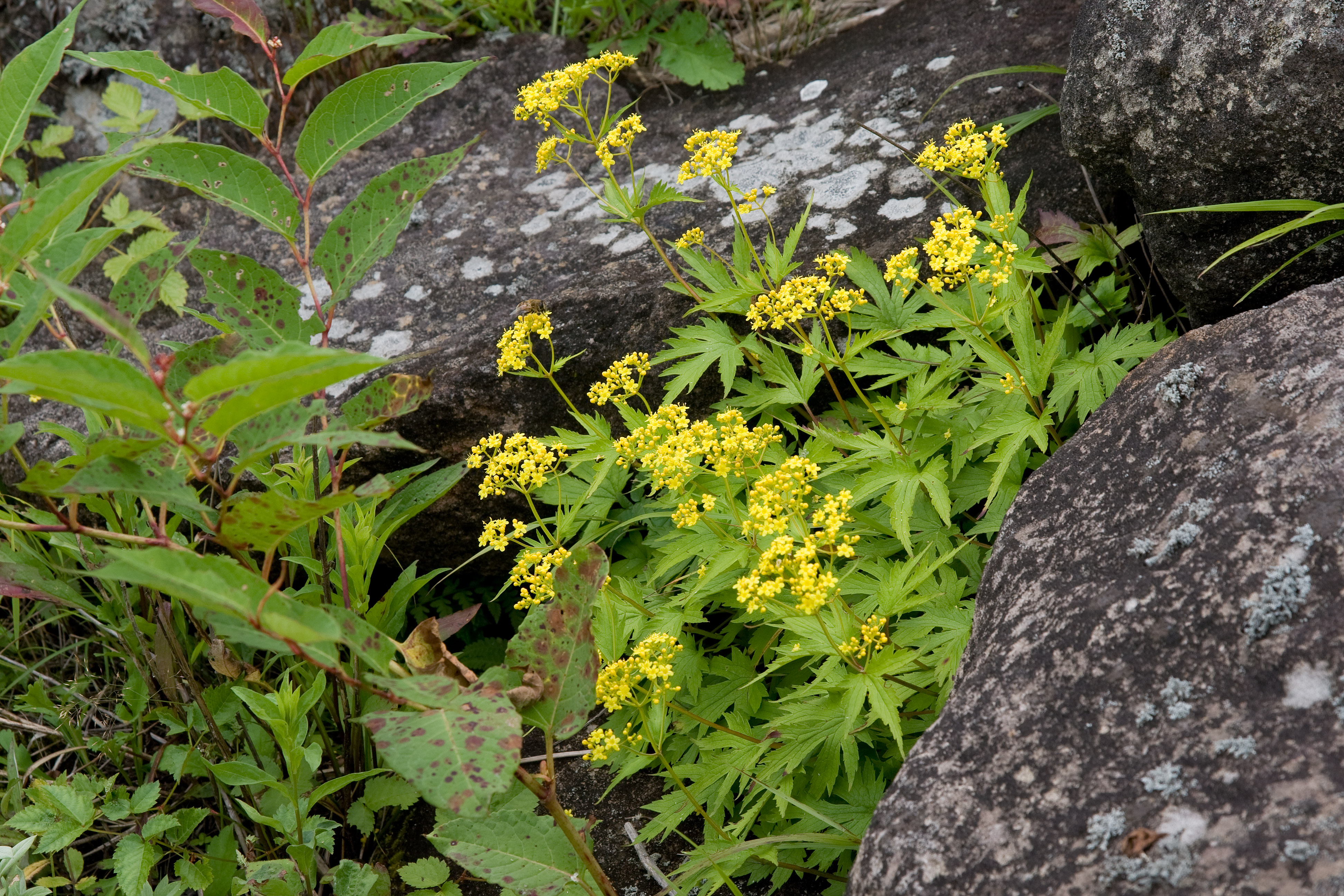 コキンレイカ (学名:Patrinia triloba var. triloba)